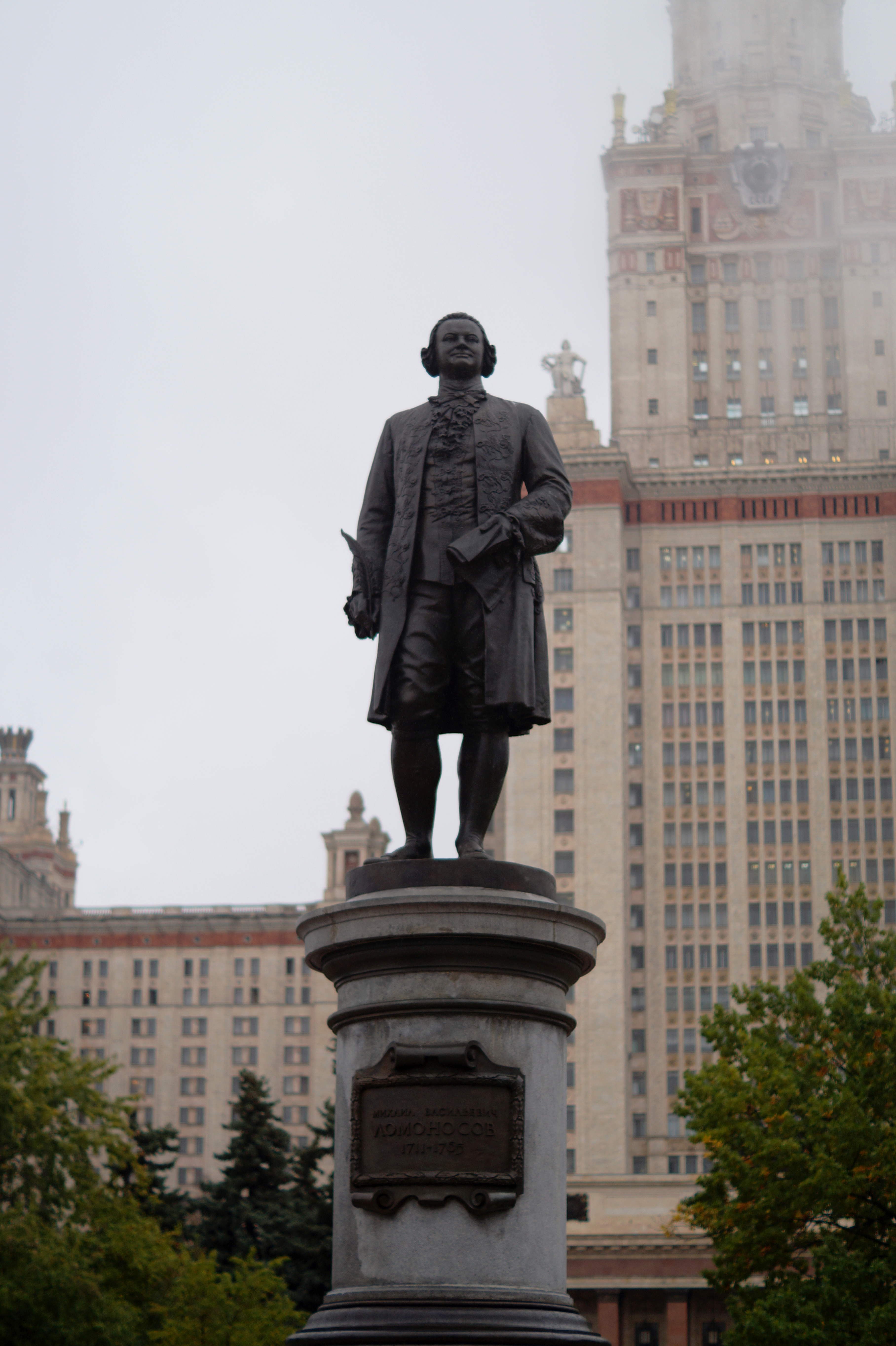 Памятник М.В.Ломоносову: Раменки, Западный округ, Москва